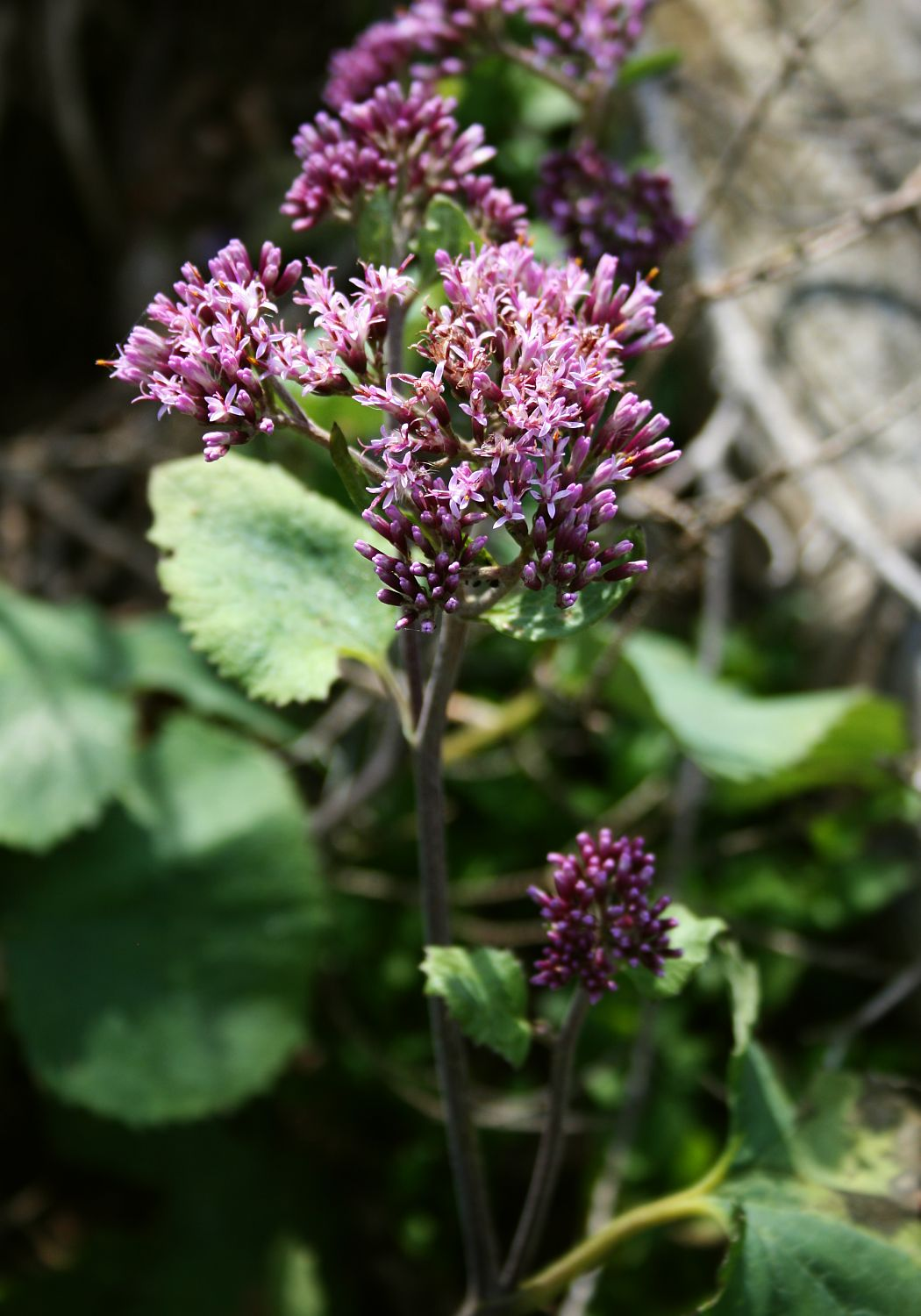 Grüner Alpendost (Adenostyles glabra), Korbblütler (Asteraceae) – Österreich/Austria/Autriche: Oberösterreich, Salzkammergut, Mitterweißenbachtal N Bad Ischl